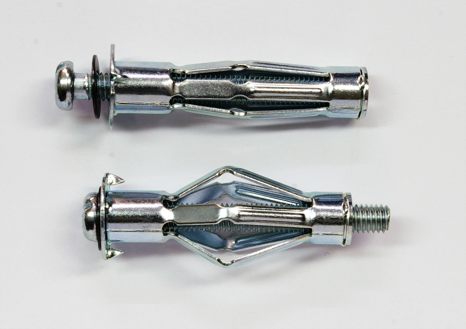 Metallspreizdübel zur Verwendung bei Hohlräumen